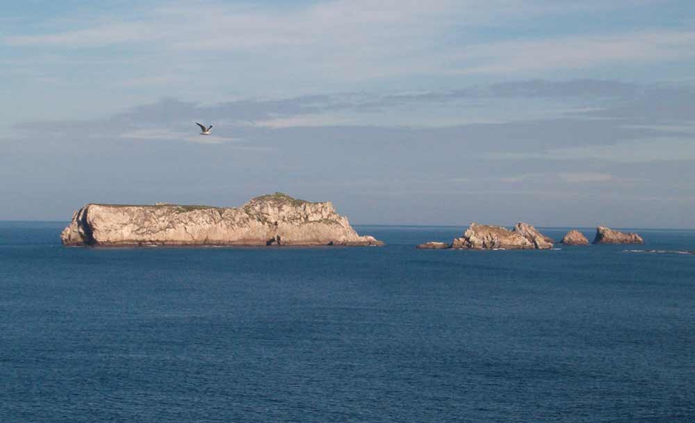 Imagen tomada desde el faro de Suances.